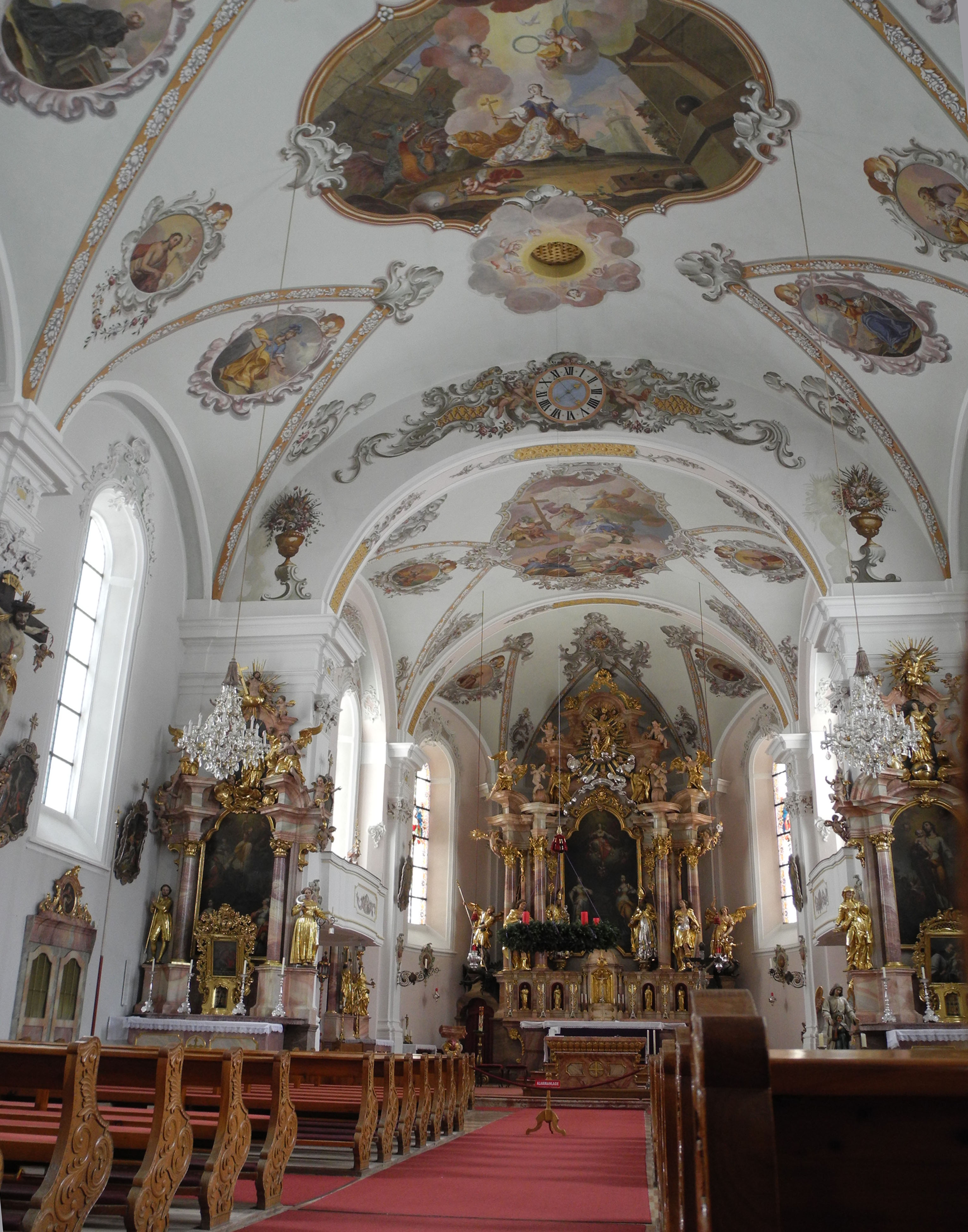 Kath. Pfarrkirche hl. Margaretha und Kriegerdenkmal